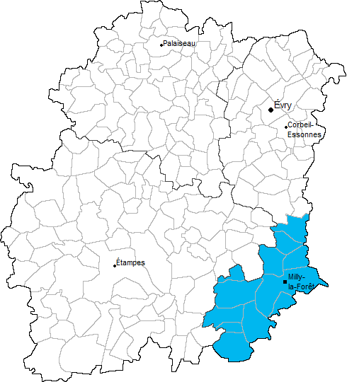 Carte de localisation du canton de Milly-la-Forêt en Essonne (91)